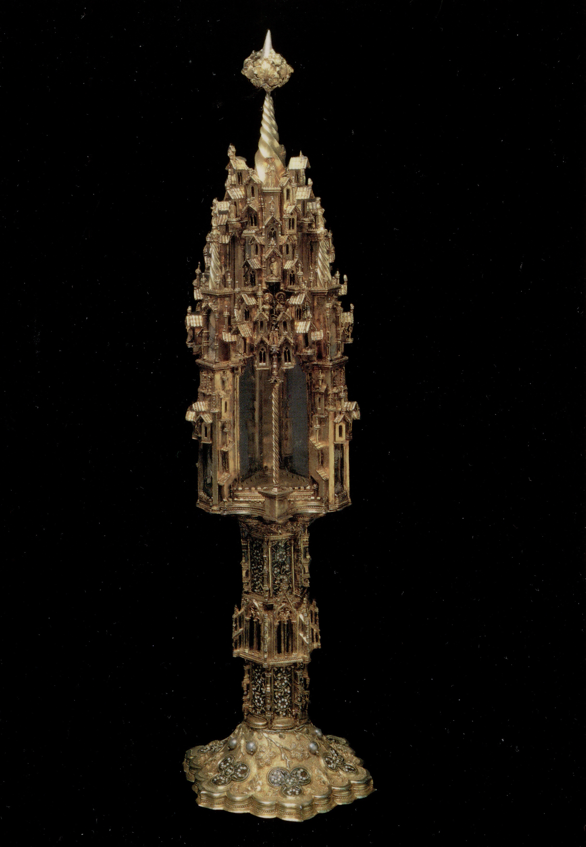 Nicolo Lionello - Ostensorio Museo del Duomo - Gemona del Friuli